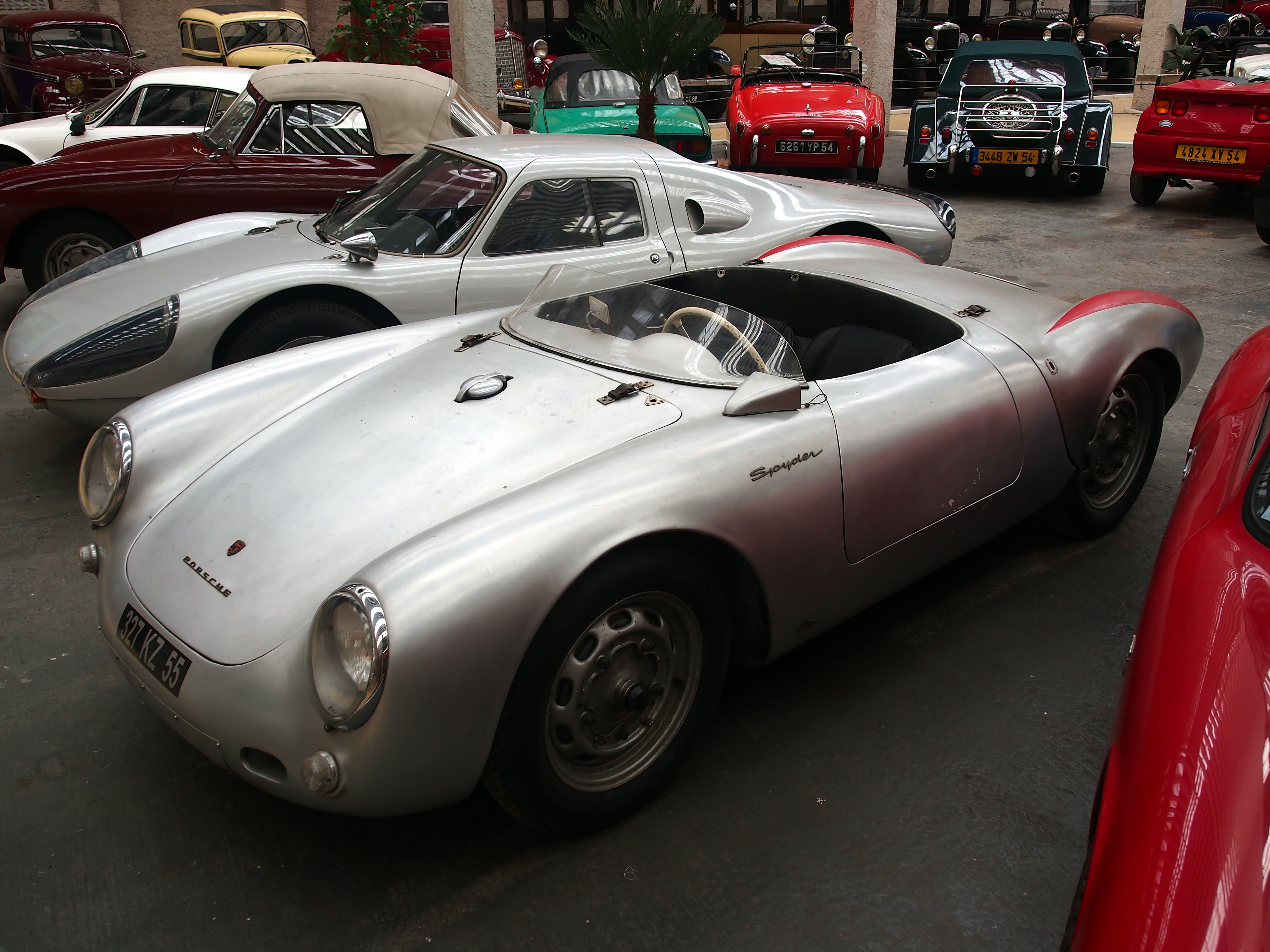 Photographed at the Association Lorraine des Amateurs d'Automobiles de collection et de loisirs.